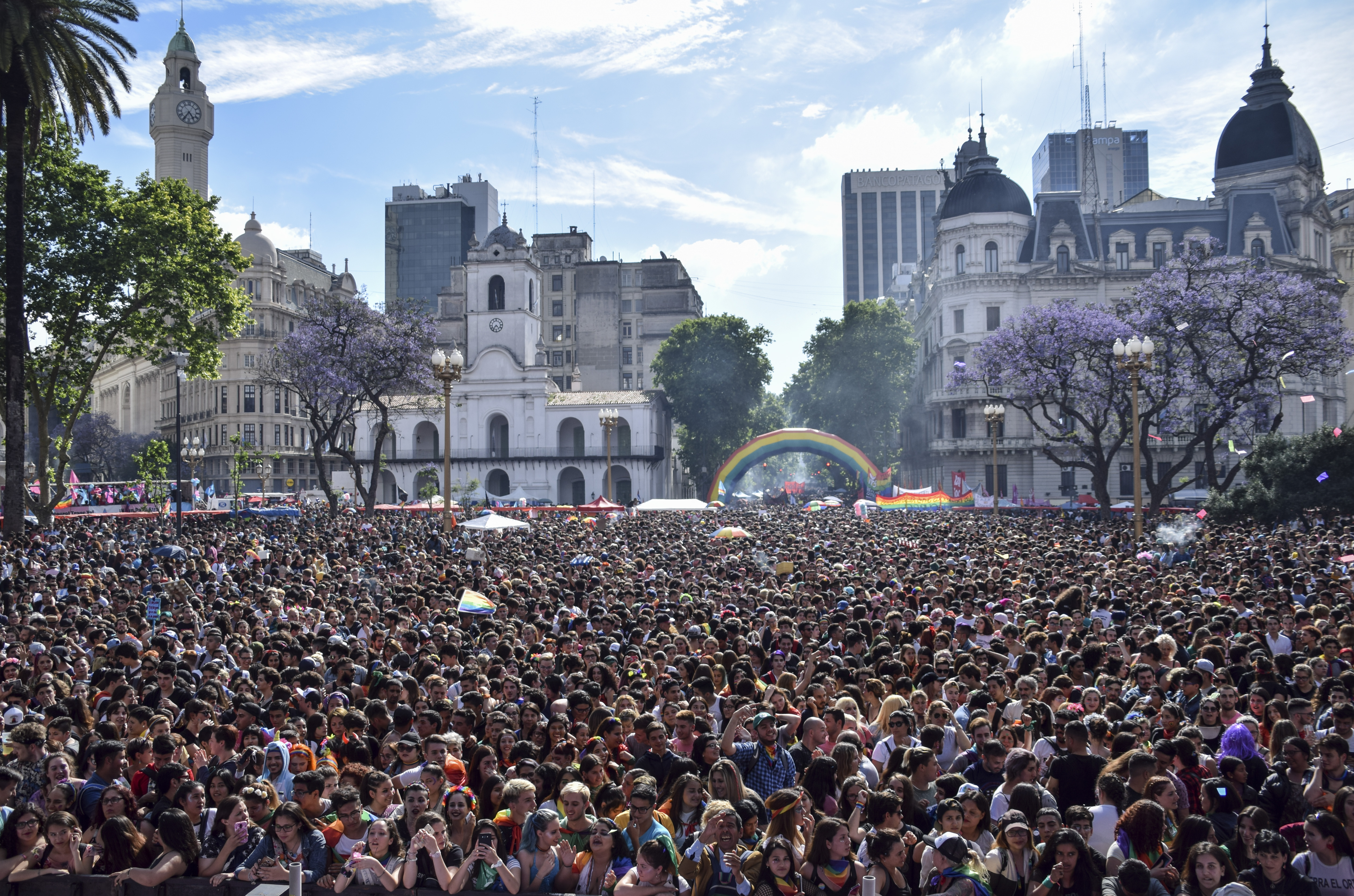 Buenos Aires, 17 de noviembre de 2018._Miles de personas celebran la 27° Marcha del orgullo LGBTIQ (Lesbianas, Gays, Bisexuales, Trans, Intersexuales y Queers) de Buenos Aires.El evento arrancó temprano el sábado con una feria en Plaza de Mayo, donde hubo shows de Mimi Maura y Jimena Barón, entre otros. Desde las 17, una caravana de carrozas marchó hasta la Plaza de los Dos Congresos. Fotos Kaloian/ Secretaría de Cultura de la Nación.